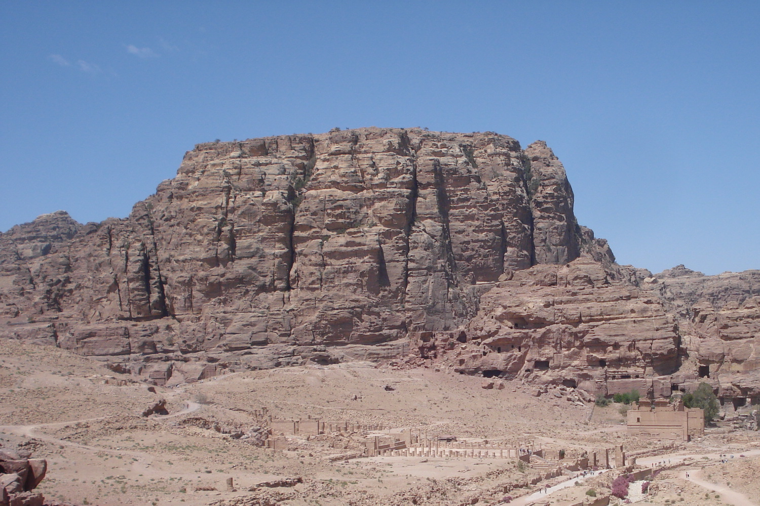 Umm al-Biyara and the Great Temple from the Byzantine church (Petra)